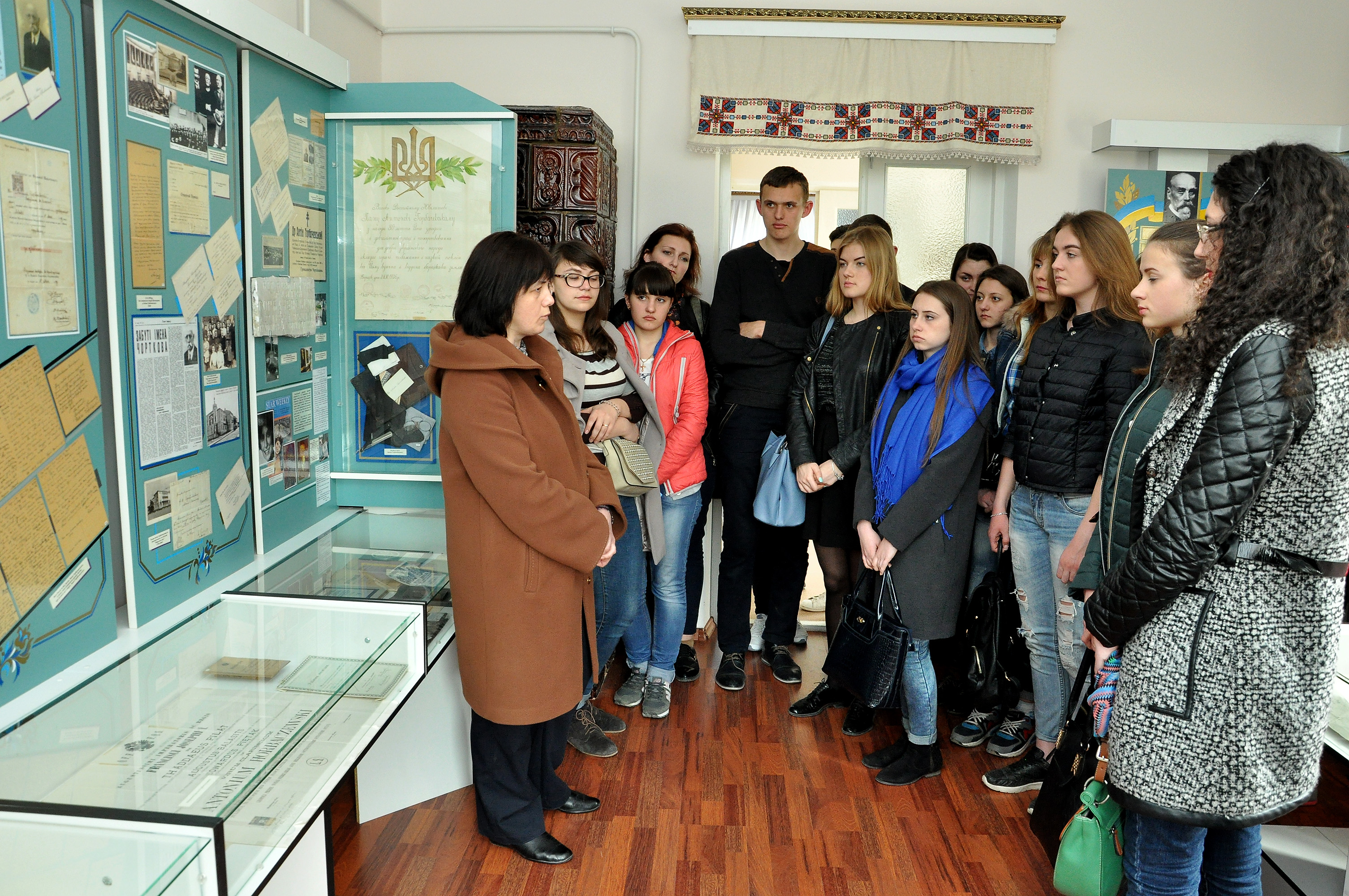 Студенти Тернопільського державного медичного університету на екскурсії в Музеї-садибі Івана Горбачевського в селі Зарубинцях Збаразького району Тернопільської області